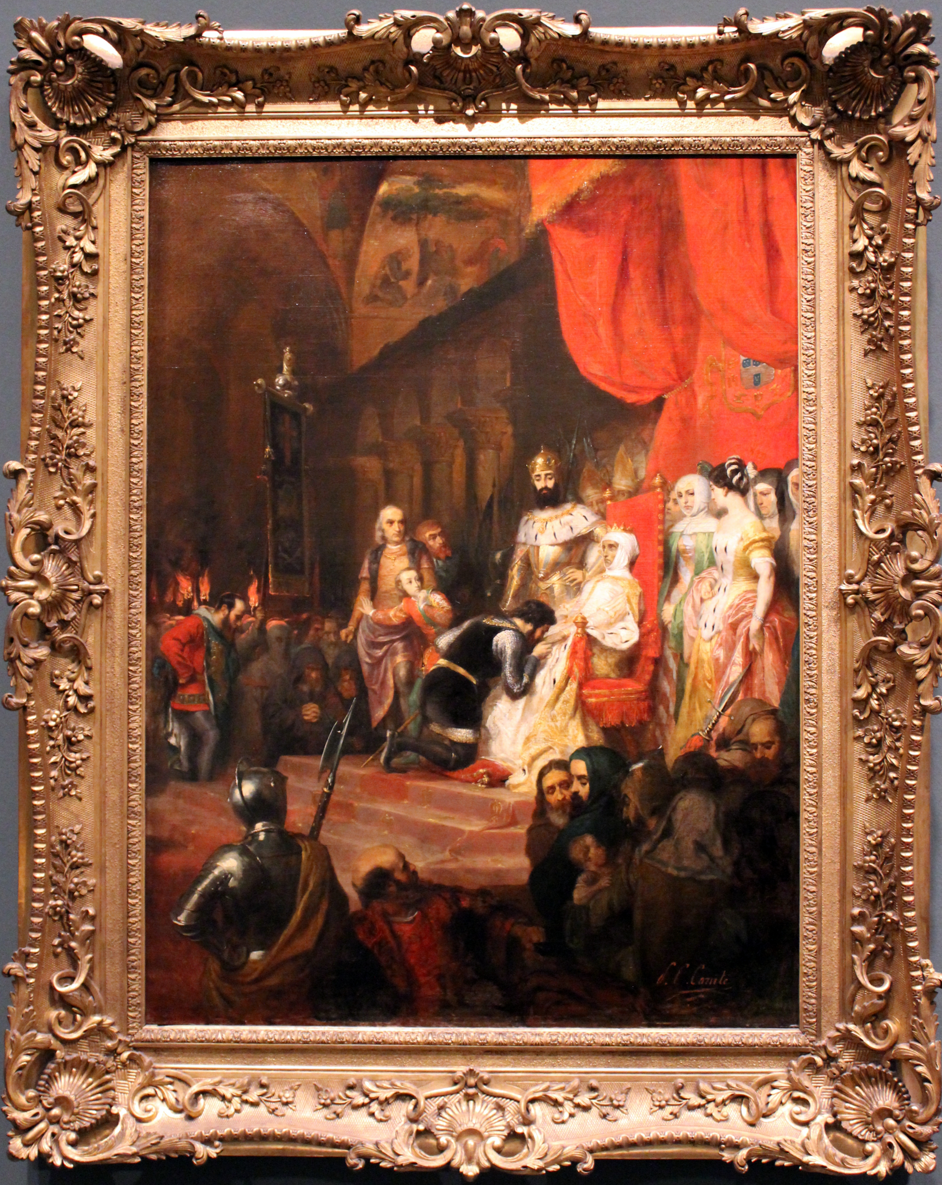 Le Couronnement d'Inès de Castro en 1361, peint par Pierre-Charles Comte vers 1849, exposé au Musée des beaux-arts de Lyon en 2014.